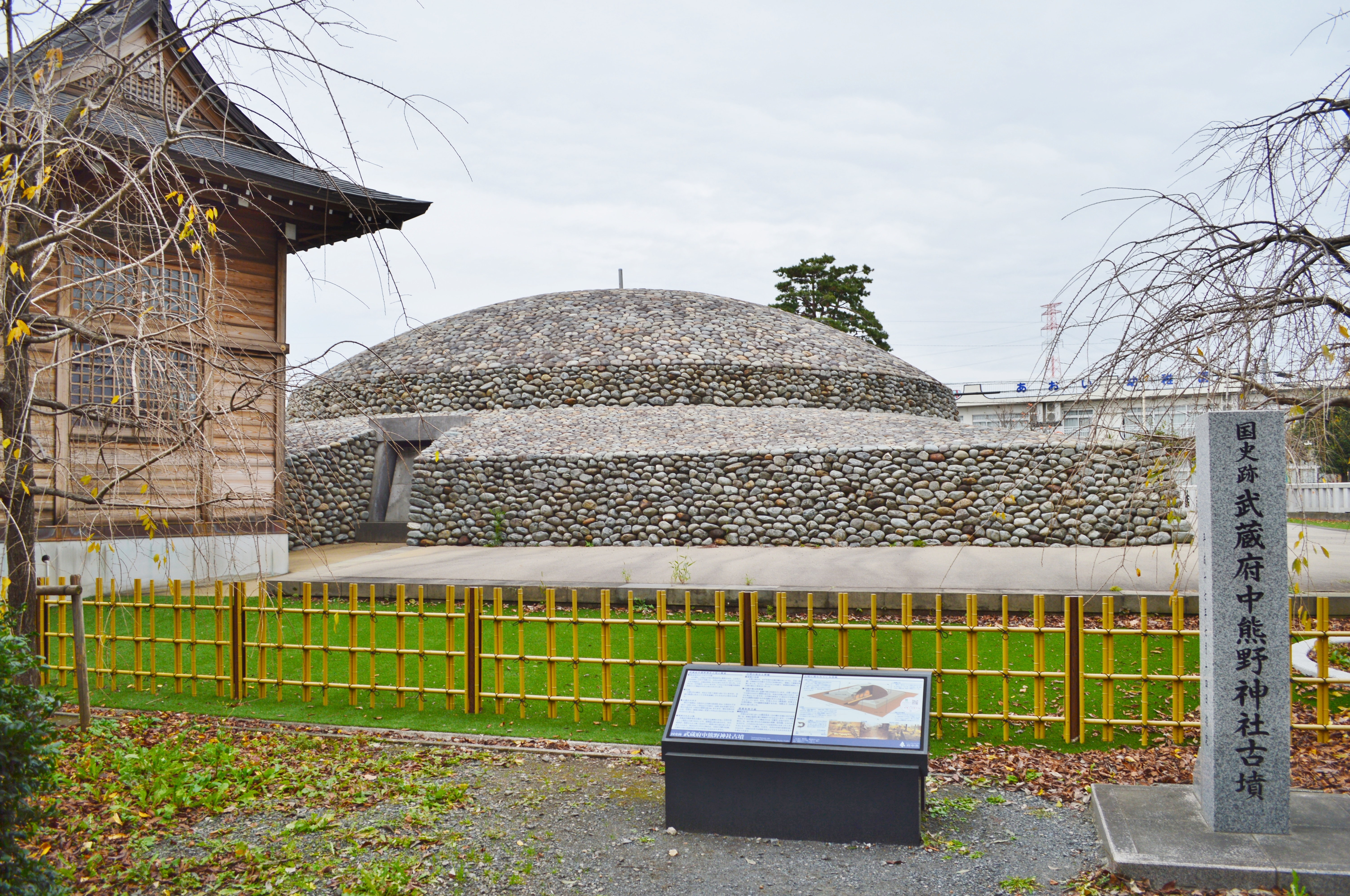 武蔵府中熊野神社古墳 墳丘